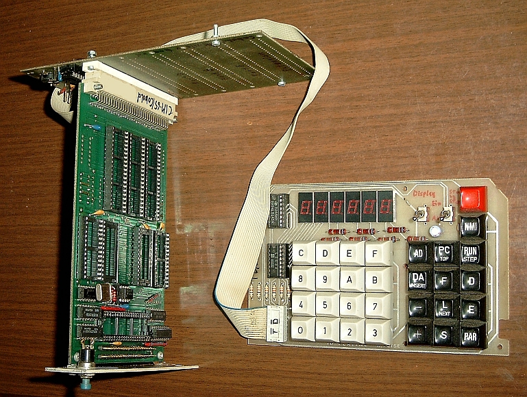 3-Platinen Microcomputer COBOLD